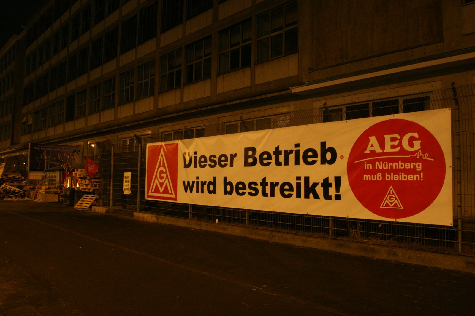 Streikplakat am AEG-Werk Nürnberg